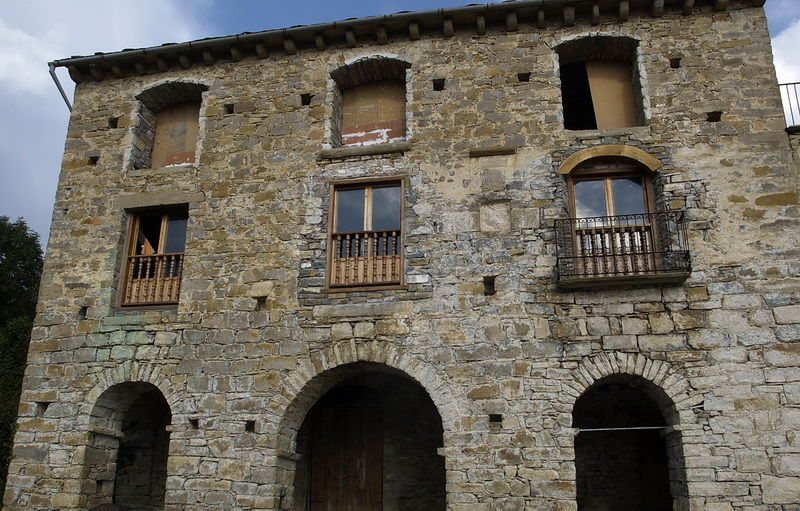 Edificio de la localidad de Griébal, en el municipio oscense de Aínsa-Sobrarbe. Se trata de uno de los edificios en fase de restauración por parte de los Grupos Scouts.